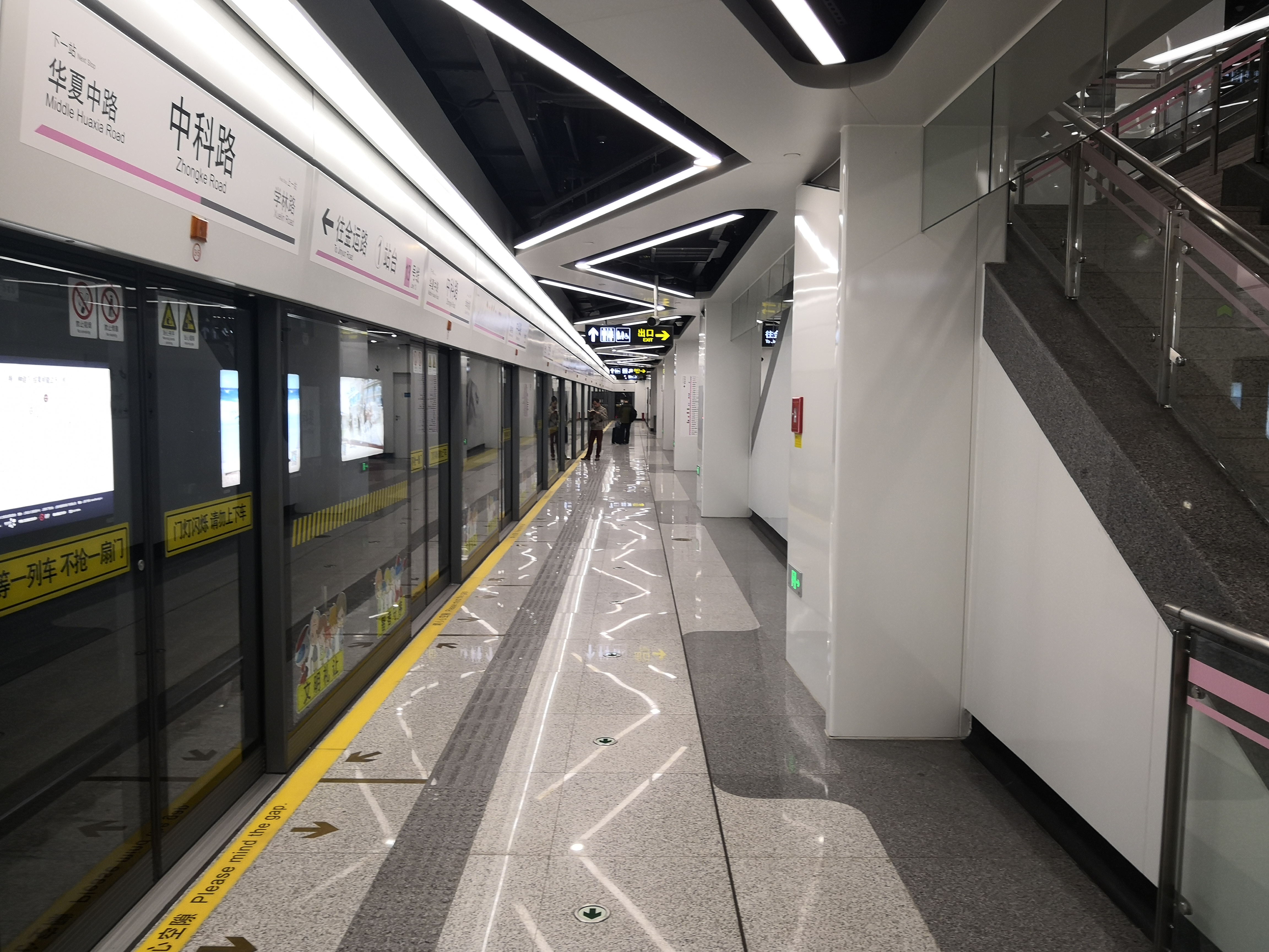 中科路站站台